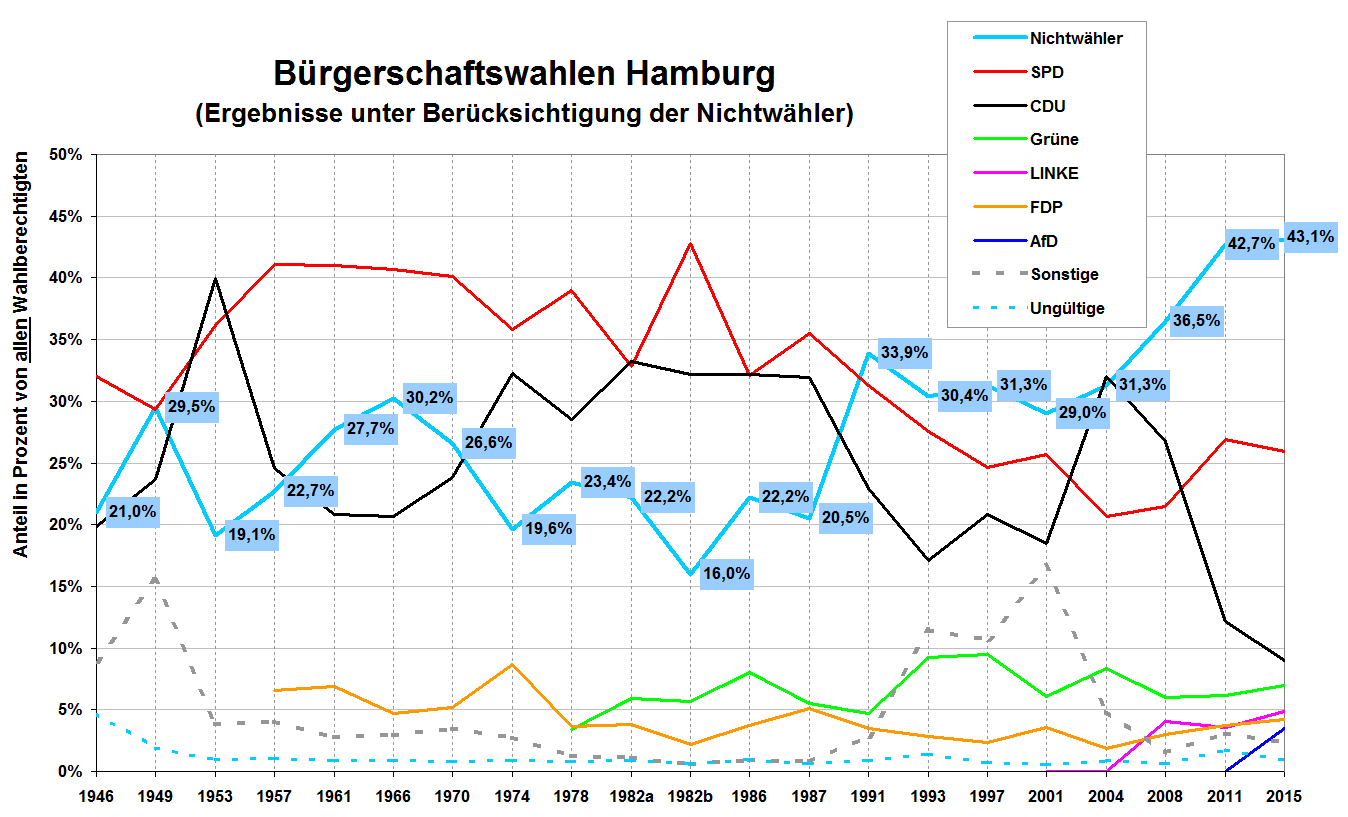 Entwicklung des Anteils der Nichtwähler bei den Bürgerschaftswahlen in Hamburg